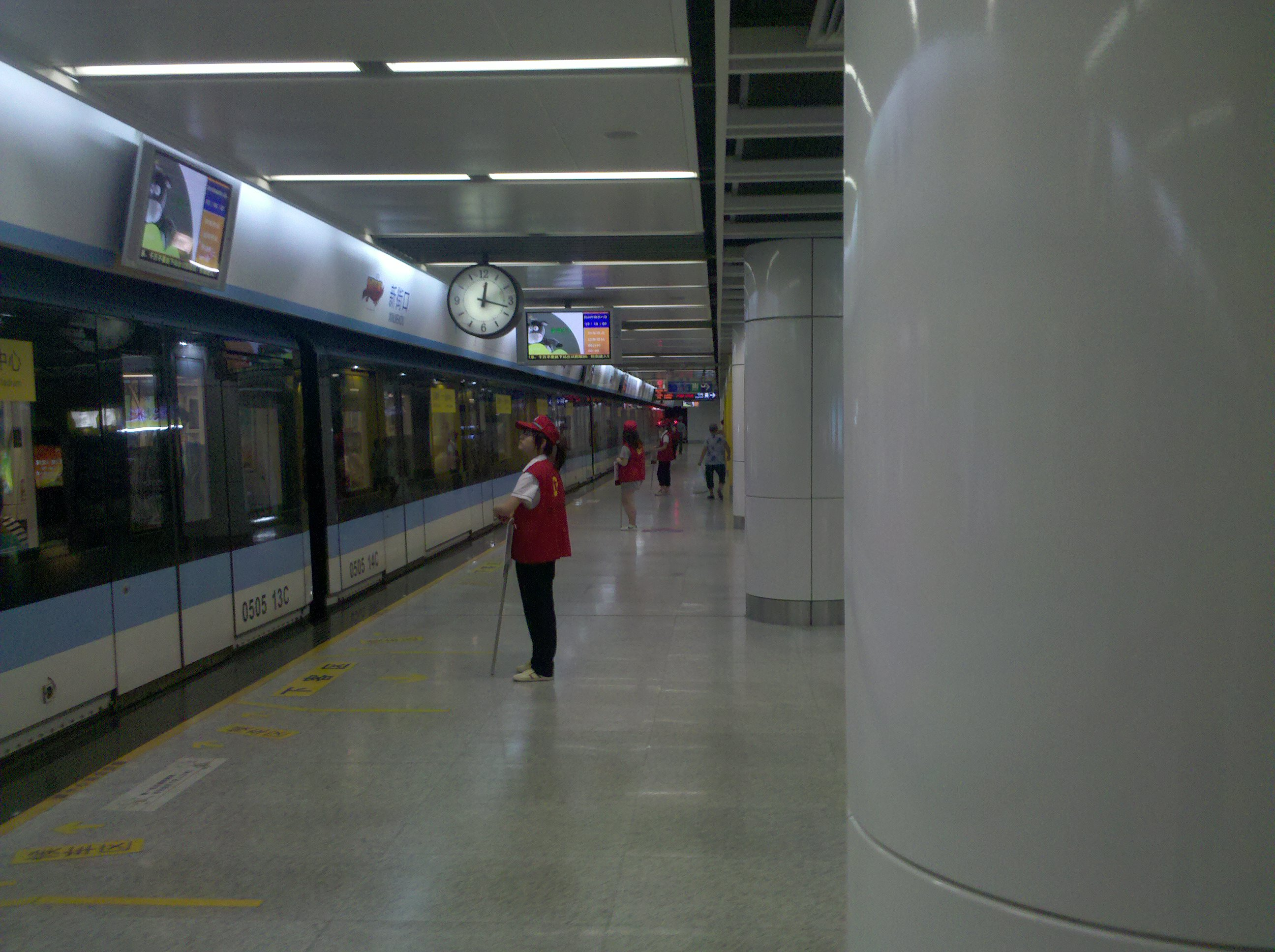 南京地铁一号线新街口站